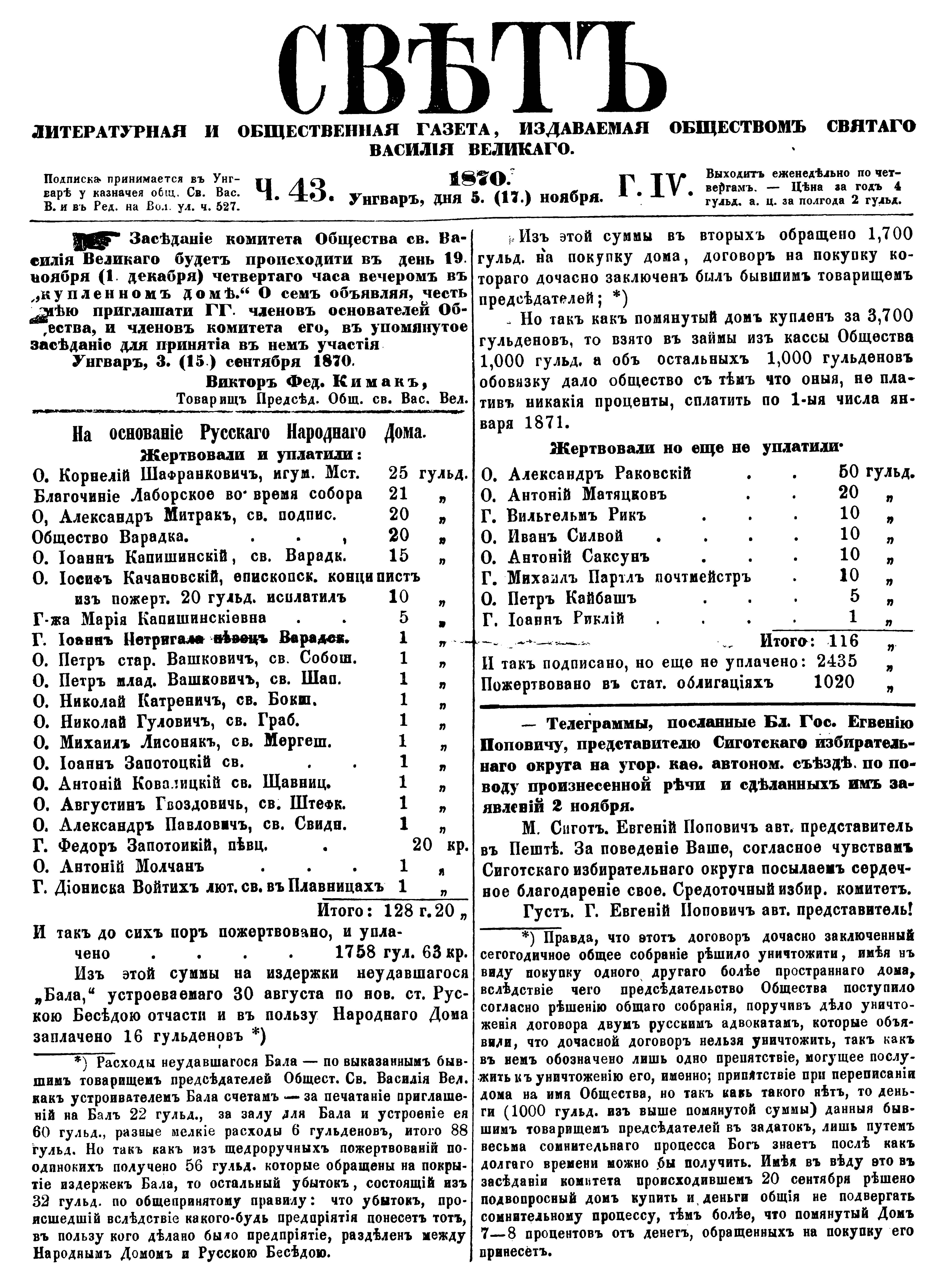 Фото. Перша сторінка газети "Свѣтъ" (Світ) від 5 листопада 1870 року. Один із останніх випусків. Для ілюстрування статті